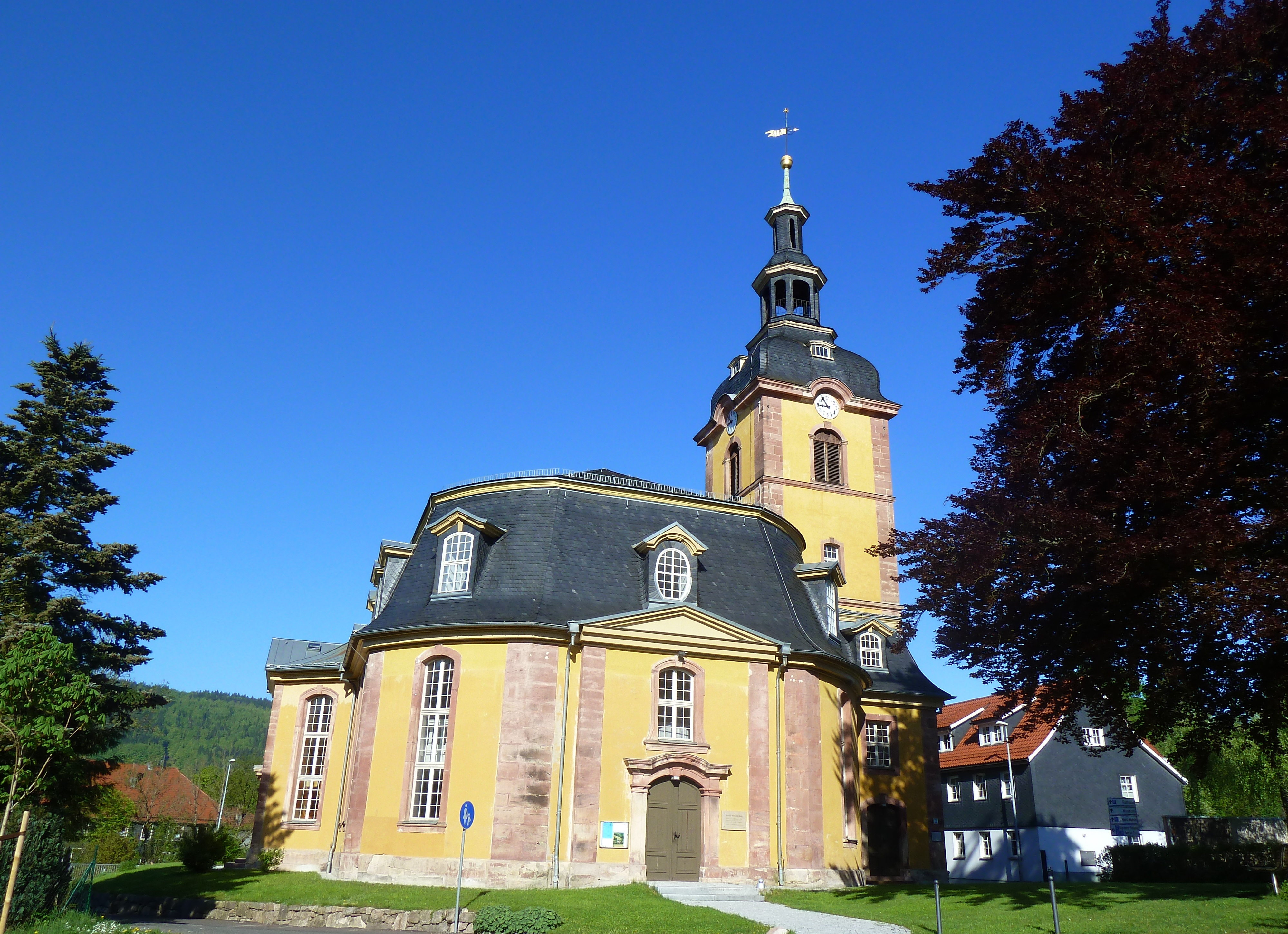 Kirche Zella St. Blasii